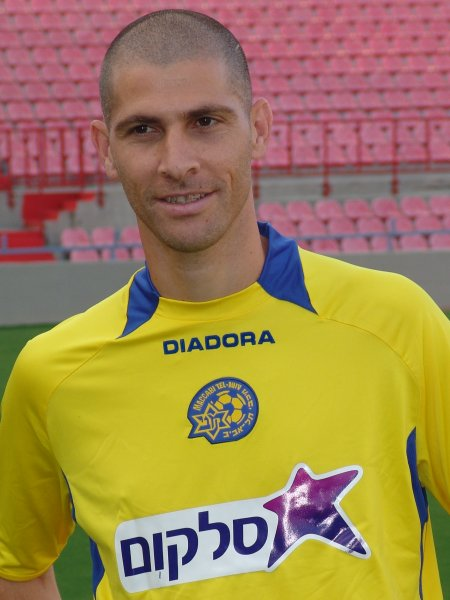 אבי נמני, שחקן מכבי תל אביב (Avi Nimni of Maccabi Tel Aviv)